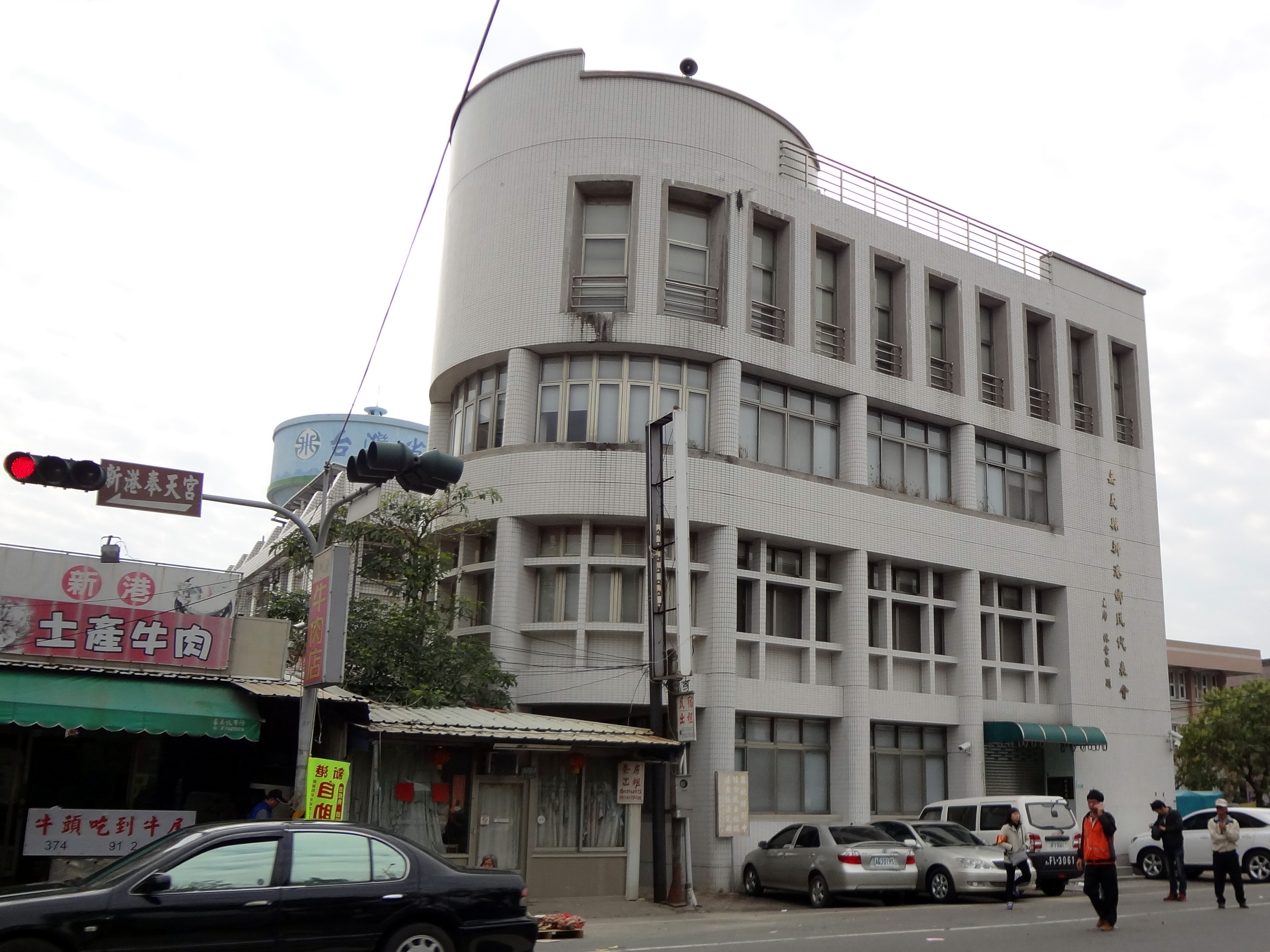 嘉義縣新港鄉民代表會，地址：嘉義縣新港鄉中山路155號。